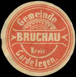 Sealing stamp Title: Gemeinde Brüchau Kreis Gardelegen Description: rot, weiß Place: Brüchau size: 4 cm